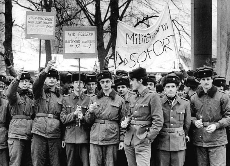 Cottbus, Soldatendemonstration ADN-ZB Weisflog 12.1.90 Cottbus: Soldatendemonstration- Auf einer gemeinsamen Demonstration in der Albert-Zimmermann-Kaserne forderten am 3.1.1990 Angehörige von zwei Truppenverbänden der NVA des Cottbusser Raumes eine sofortige Miltärreform, verbunden mit einer Reduzierung der Wehrdienstzeit auf 12 Monate.